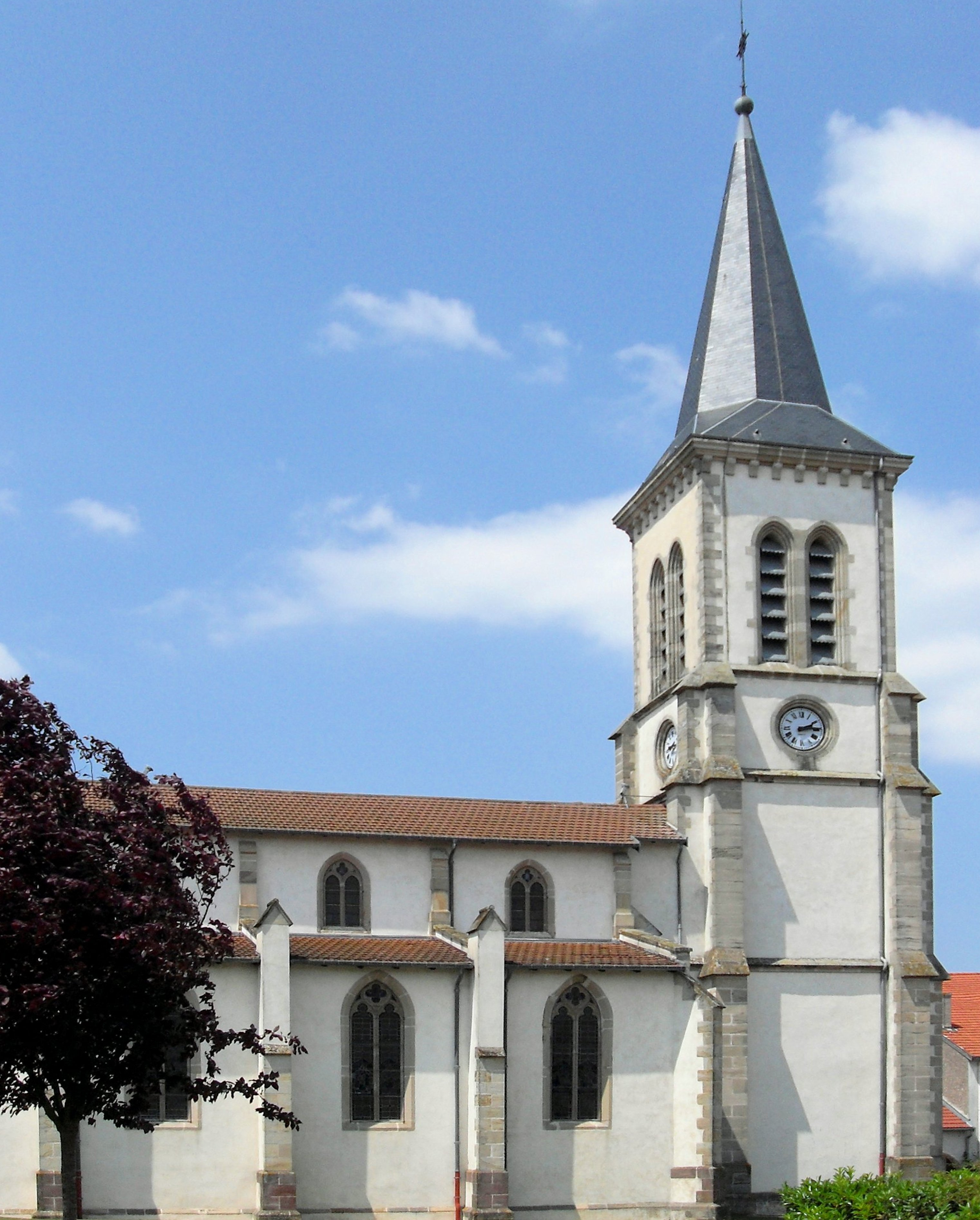 L'église Saint-Élophe à Rouvres-en-Xaintois